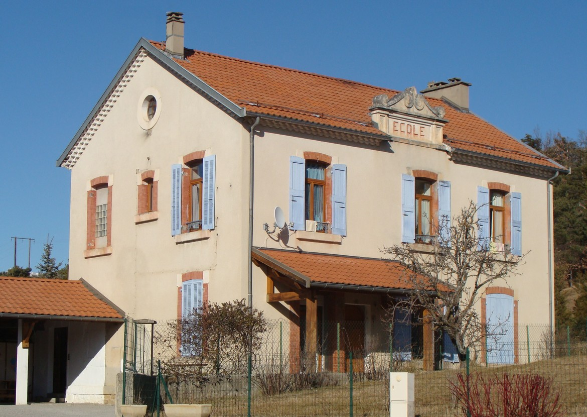 L'école communale de Chabestan (Hautes-Alpes).